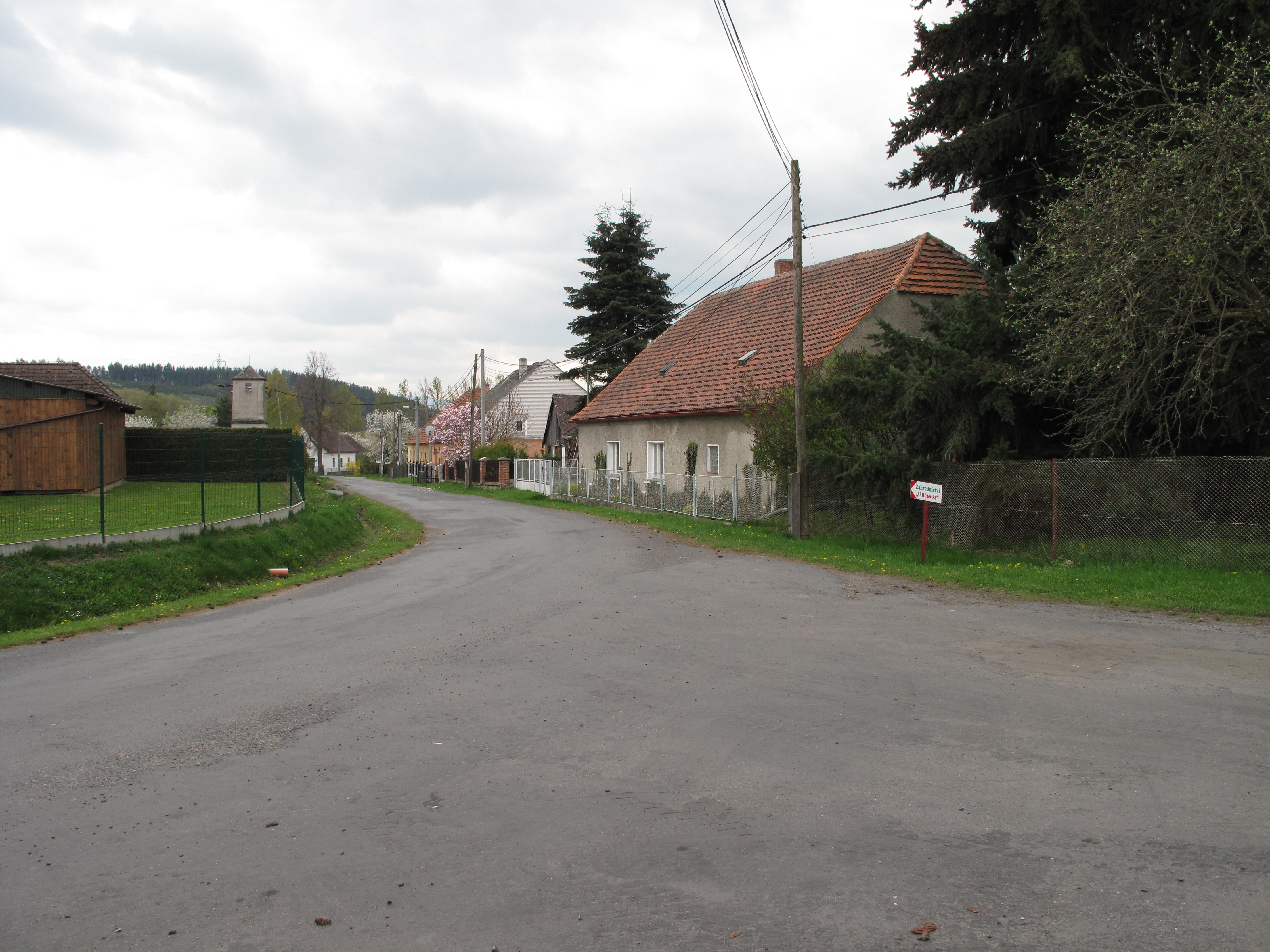 Novákovice. Okres Klatovy, Česká republika.